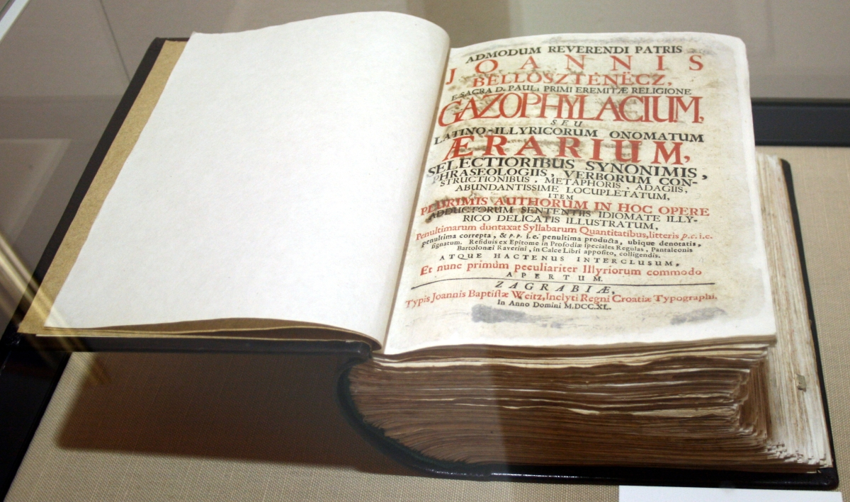 Gazophylacium, u Muzeju grada Zagreba snimljen tijekom Noći muzeja